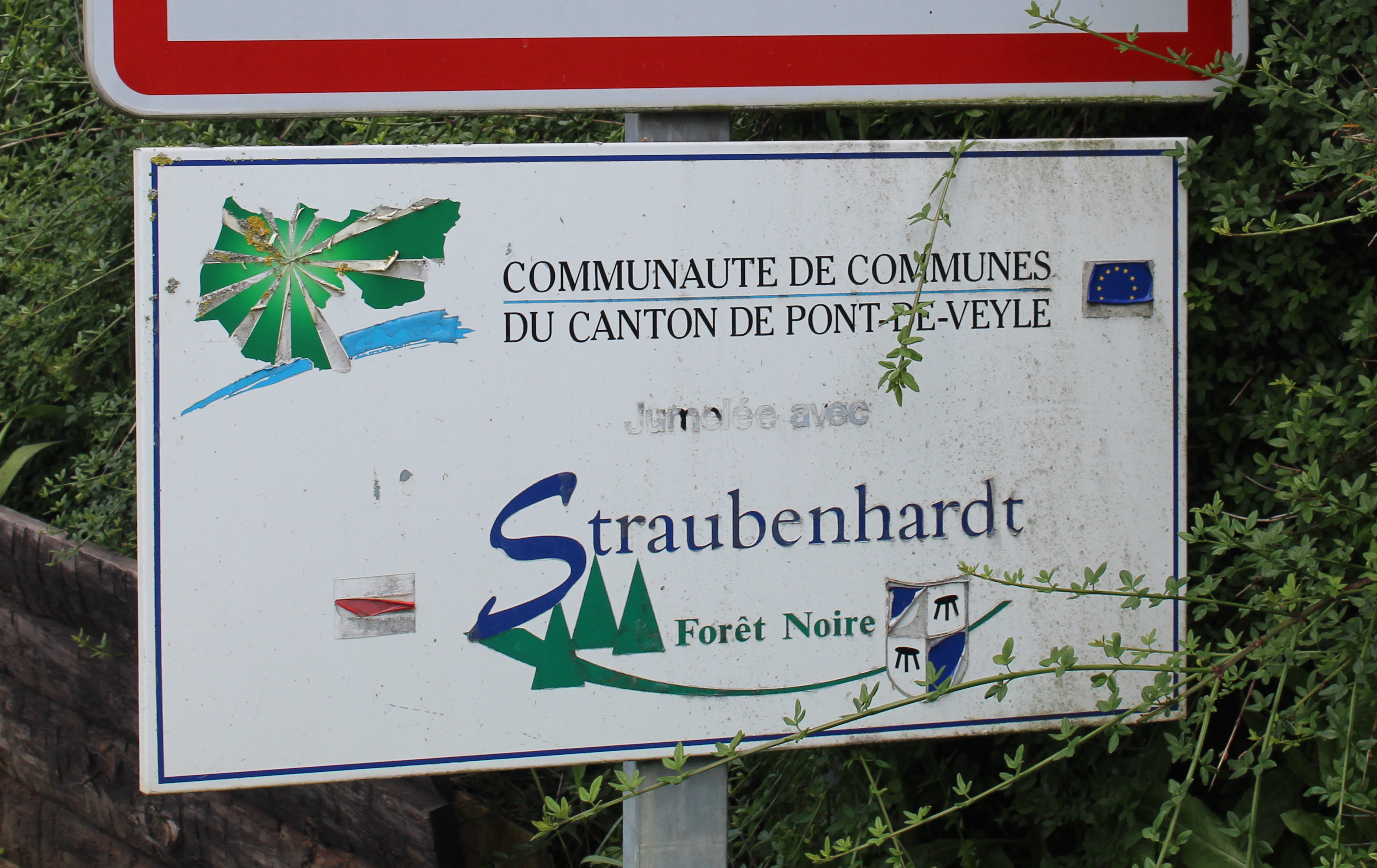 Panneau indiquant le jumelage entre le canton de Pont-de-Veyle et Straubenhardt à Perrex.